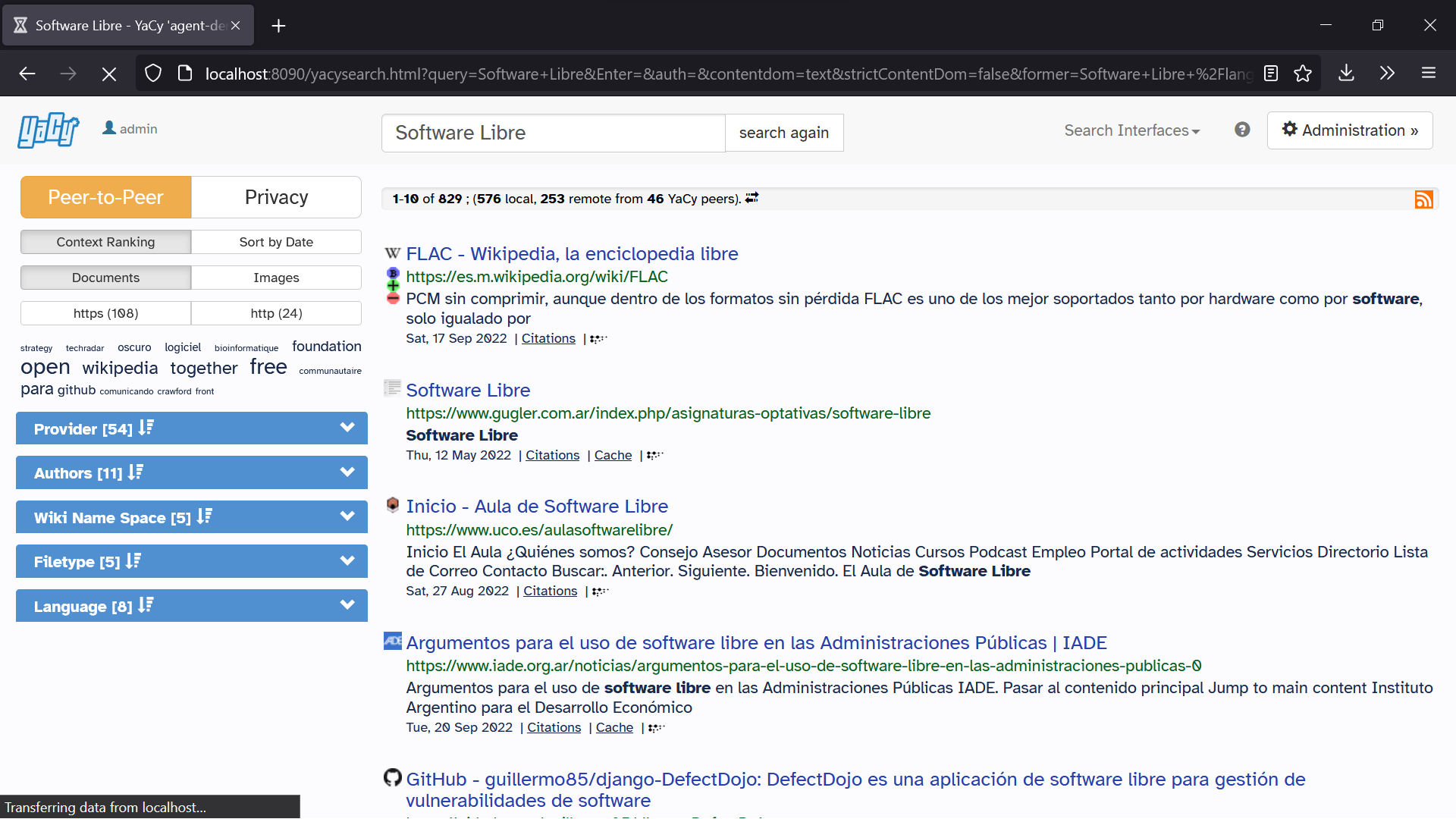 Captura de pantalla del buscador Yacy mostrando resultados de búsqueda.